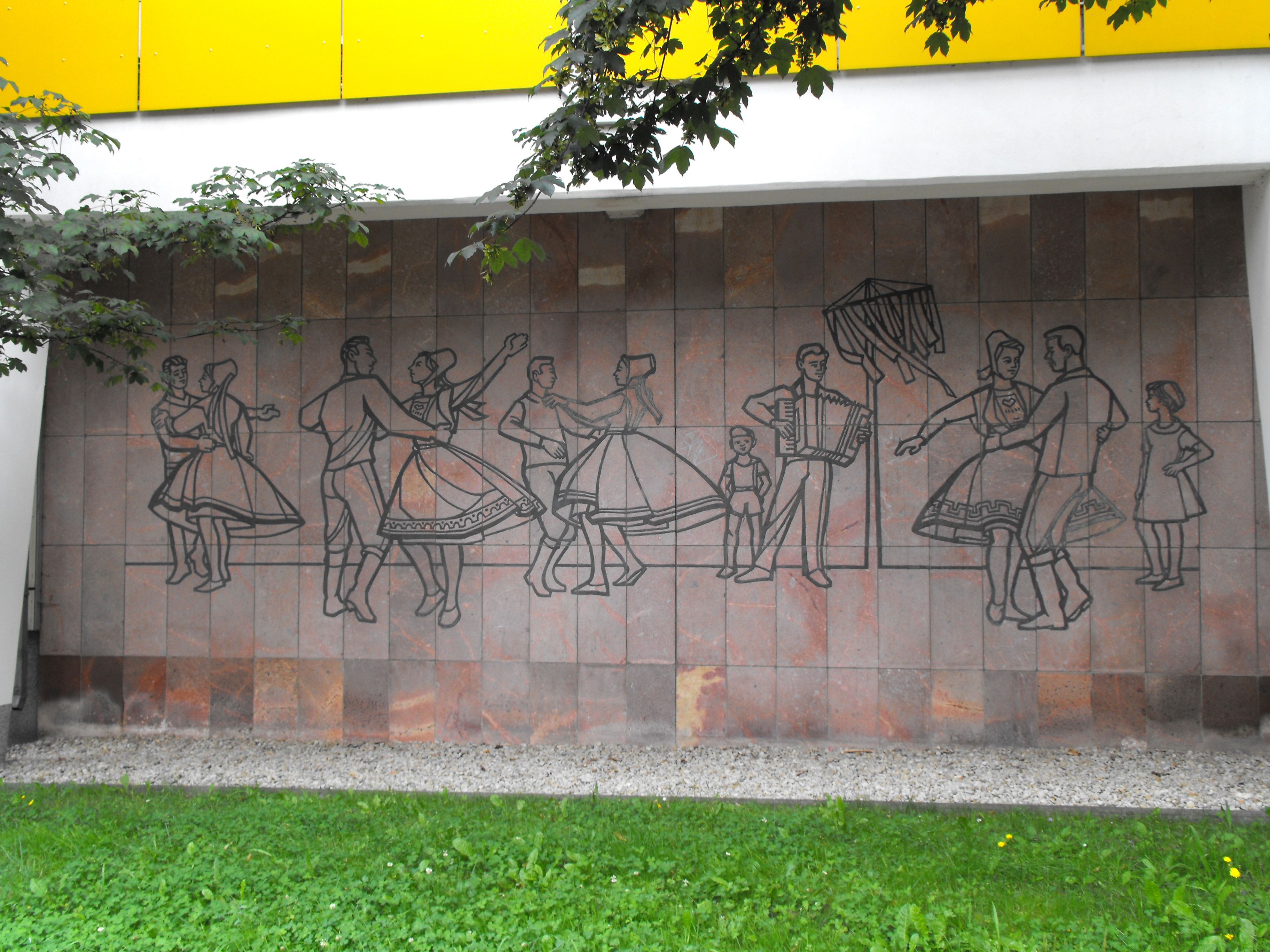 Bleiintarsien in der Chemnitzer Brückenstrasse in Zusammenarbeit von Johannes Belz, Robert Diedrichs, Rudolf Fleischer und Rudolf Kraus Entwurf: Robert Diedrichs